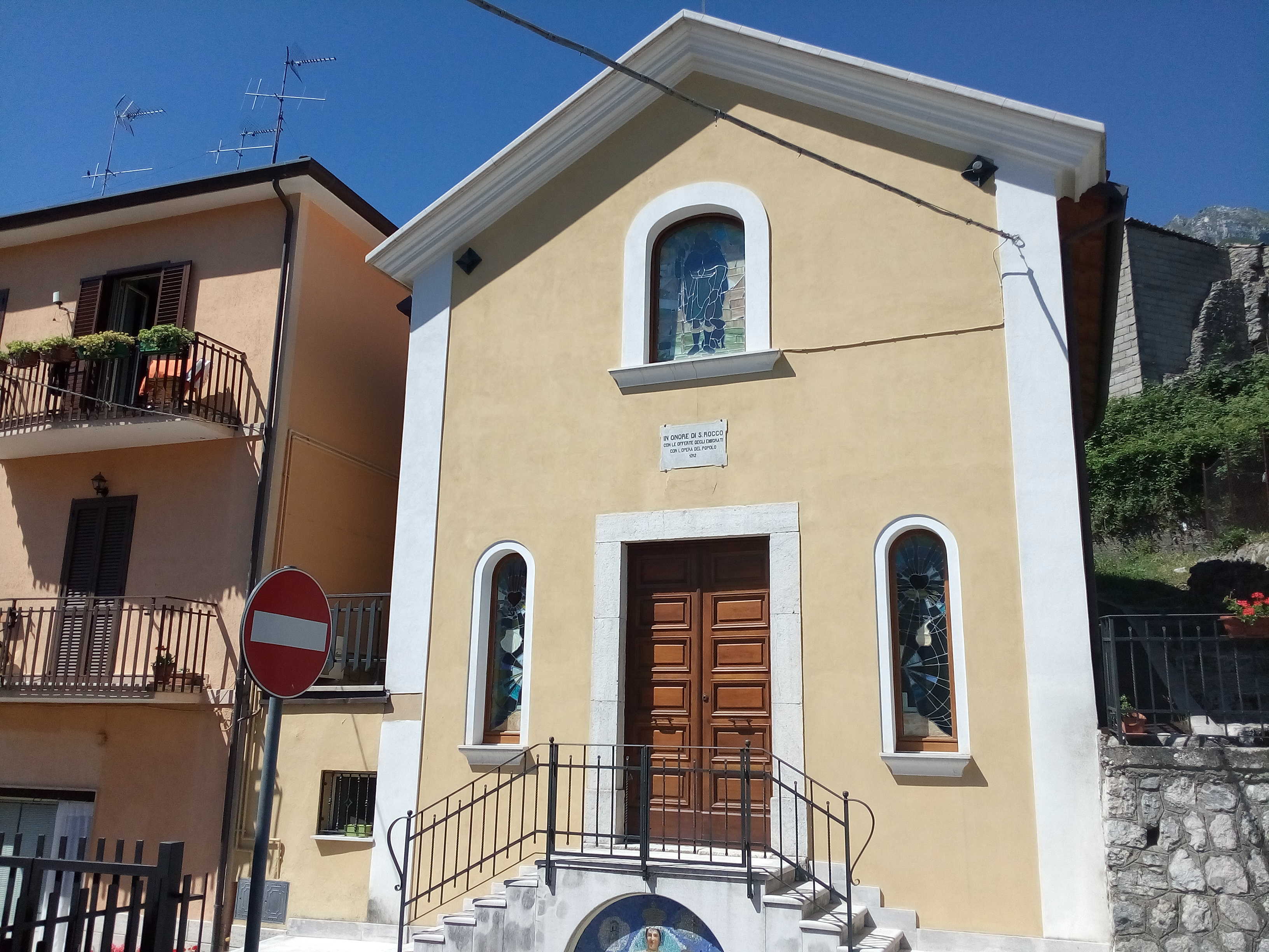 Chiesa di San Rocco a Roccavivi in Abruzzo